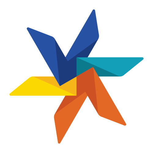 Emblema del partido político mexicano Compromiso por Puebla